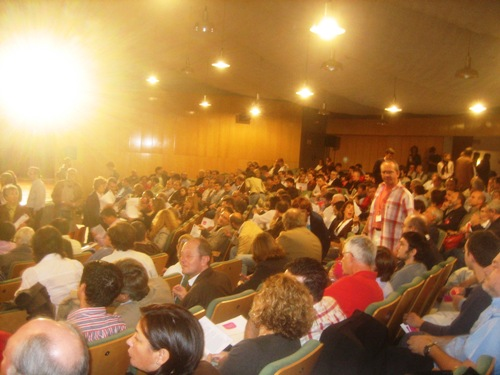 Acto fundacional UPD. Auditorio Casa de Campo, Madrid.